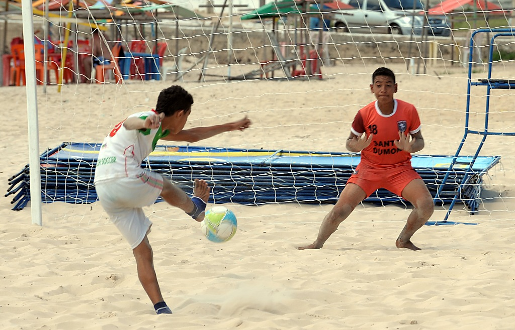 Etapa Estadual Infantil dos JEMs. (Foto: Biaman Prado/Sedel)